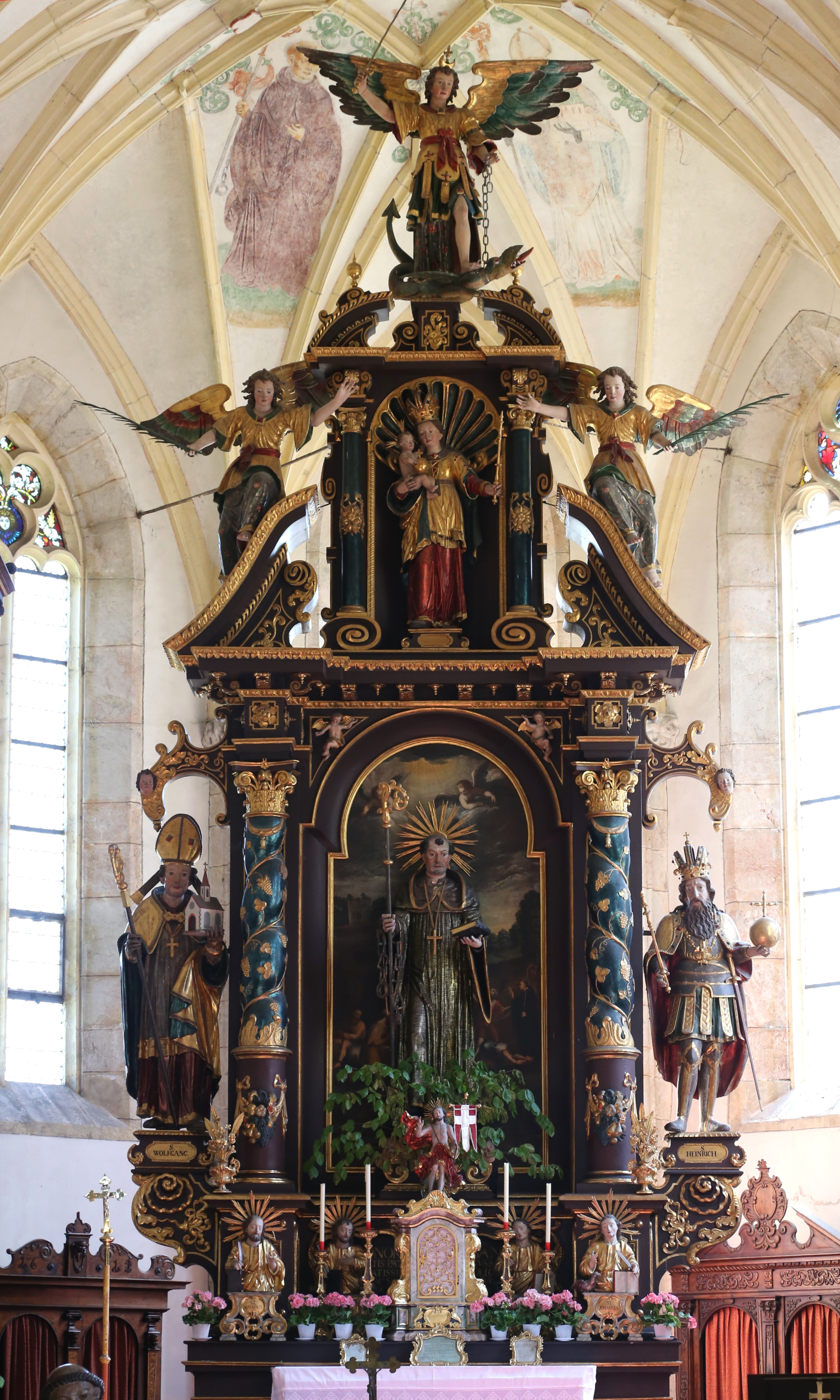 Filialkirche hl. Leonhard, Kundl; spätgotischer Bau mit hohem Turm an der Südwestecke, von Mauer umgeben. Einheitlicher Bau um 1480 bis Anfang 16. Jahrhundert This media shows the remarkable cultural object in the Austrian state of Tyrol listed by the Tyrolean Art Cadastre with the ID 3207. (on tirisMaps, pdf, more images on Commons)